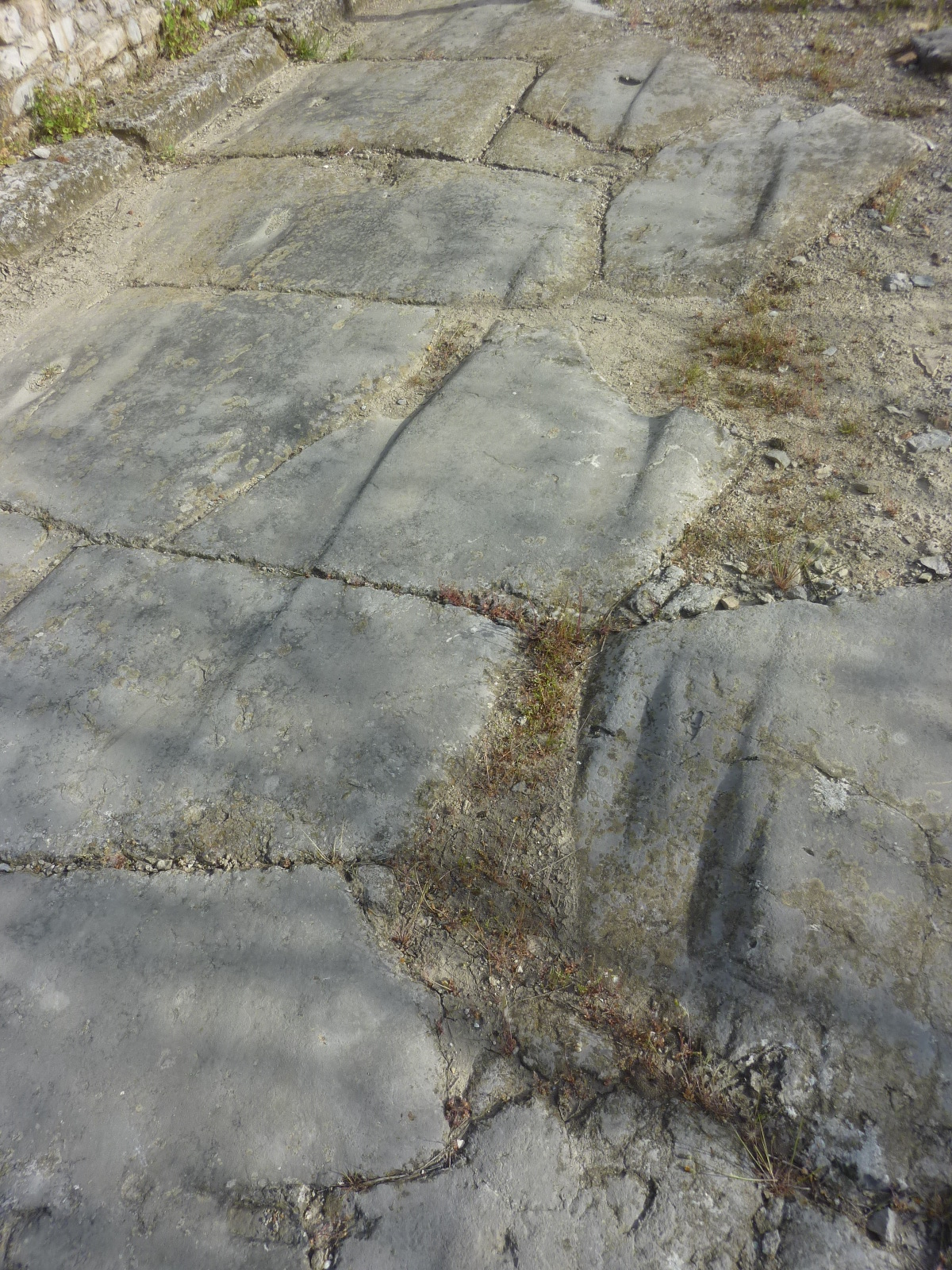 Voie dallée, site archéologique romain d'Alba-la-Romaine, Ardèche, France